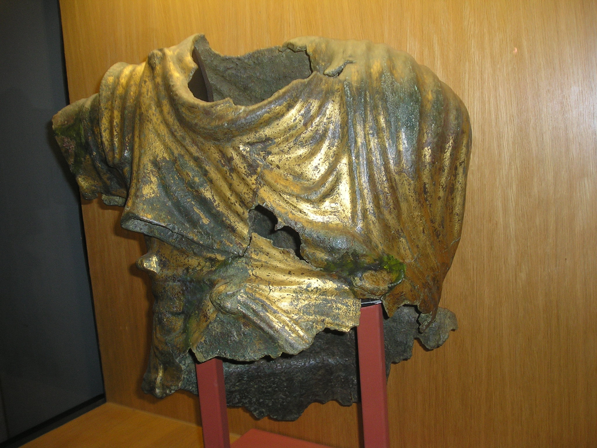 Restos de una escultura toracta de bronce dorado del siglo I, representando a alguno de los emperadores, encontrada en las excvaciones arqueológicas del Palacio de Mayoralgo en Cáceres y actualmente depositada en el Museo de Cáceres (España)